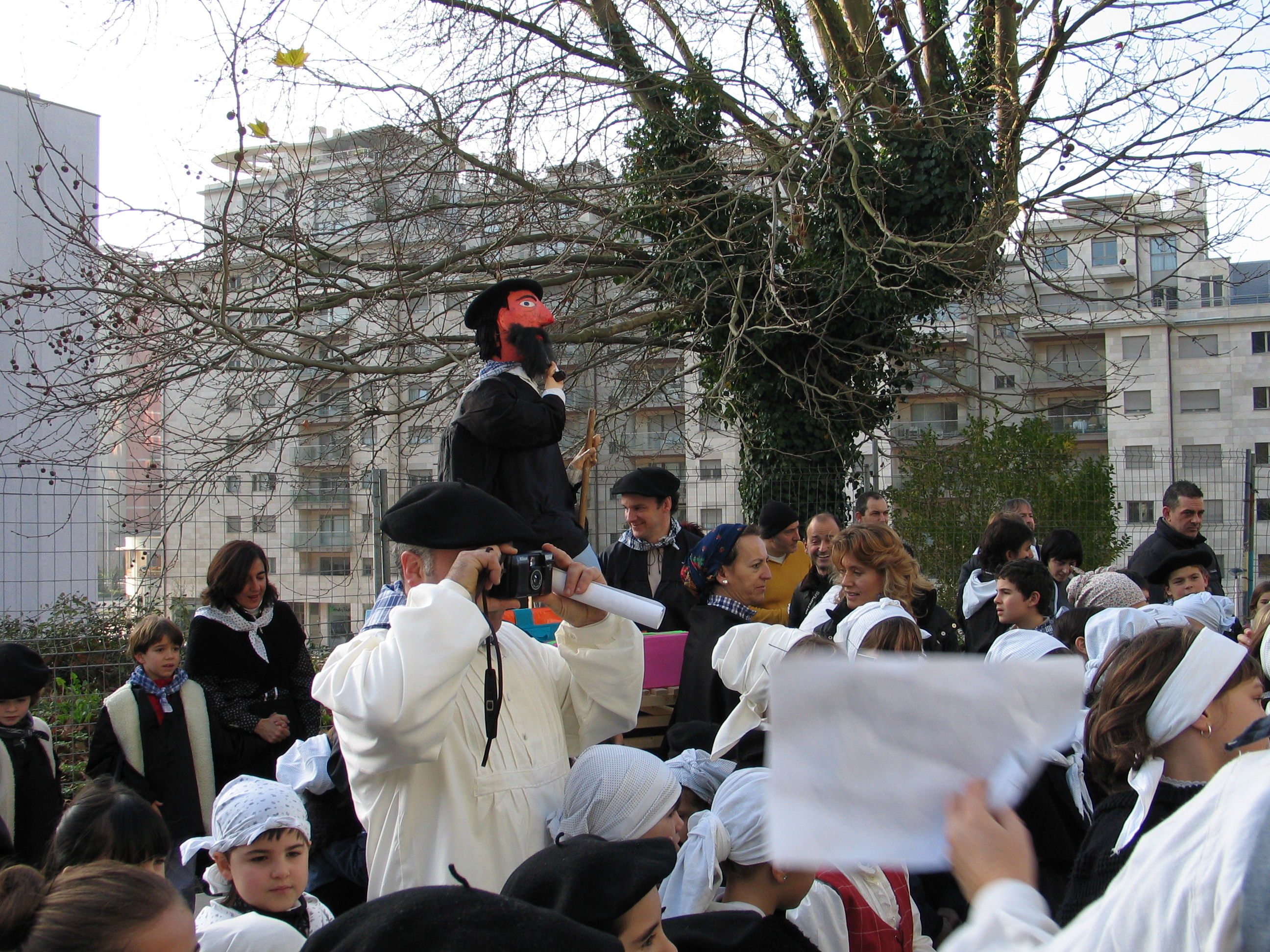 Olentzaro festa Ibai Ikastolan